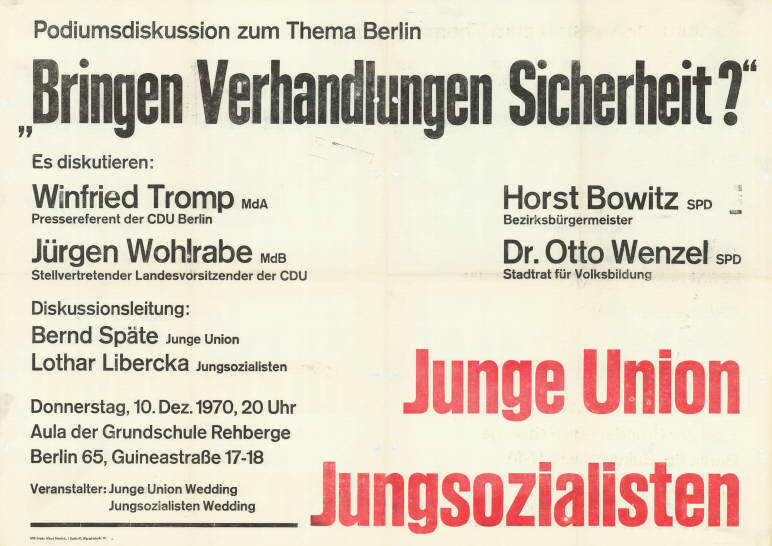 Podiumsdiskussion zum Thema Berlin "Bringen Verhandlungen Sicherheit?" Es diskutieren: Winfried Tromp MdA Pressereferent der CDU Berlin Jürgen Wohlrabe MdB Stellvertretender Landesvorsitzender der CDU Horst Bowitz SPD Bezirksbürgermeister Dr. Otto Wenzel SPD Stadtrat für Volksbildung Diskussionsleitung Bernd Späte Junge Union Lothar Libercka Jungsozialisten Veranstalter: Junge Union Wedding Jungsozialisten Wedding Plakatart: Ankündigungsplakat Auftraggeber: Junge Union und Jungsozialisten Wedding Drucker_Druckart_Druckort: Albert Hentrich, Berlin-Steglitz Objekt-Signatur: 10-028 : 313 Bestand: Plakate von Jugendorganisationen der Parteien ( 10-028) GliederungBestand10-18: Plakate von Jugendorganisationen der Parteien (10-028) » CDU » Veranstaltungsplakate A - Z Lizenz: KAS/ACDP 10-028 : 313 CC-BY-SA 3.0 DE